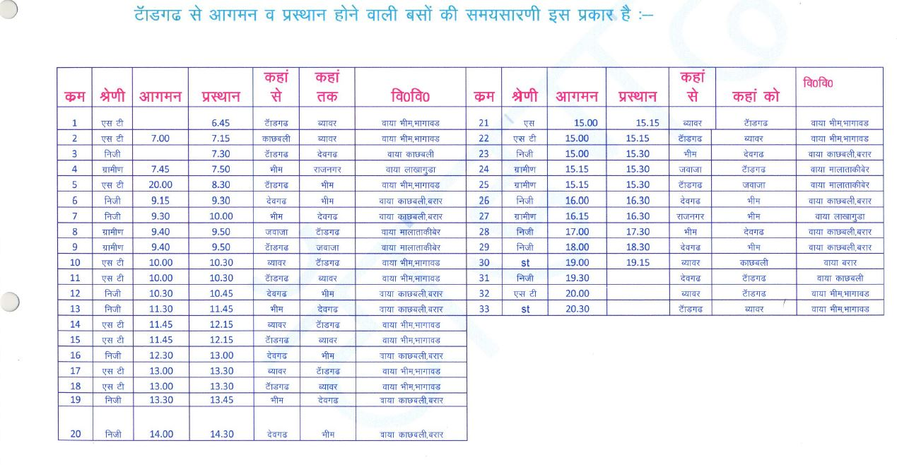 टॉडगढ